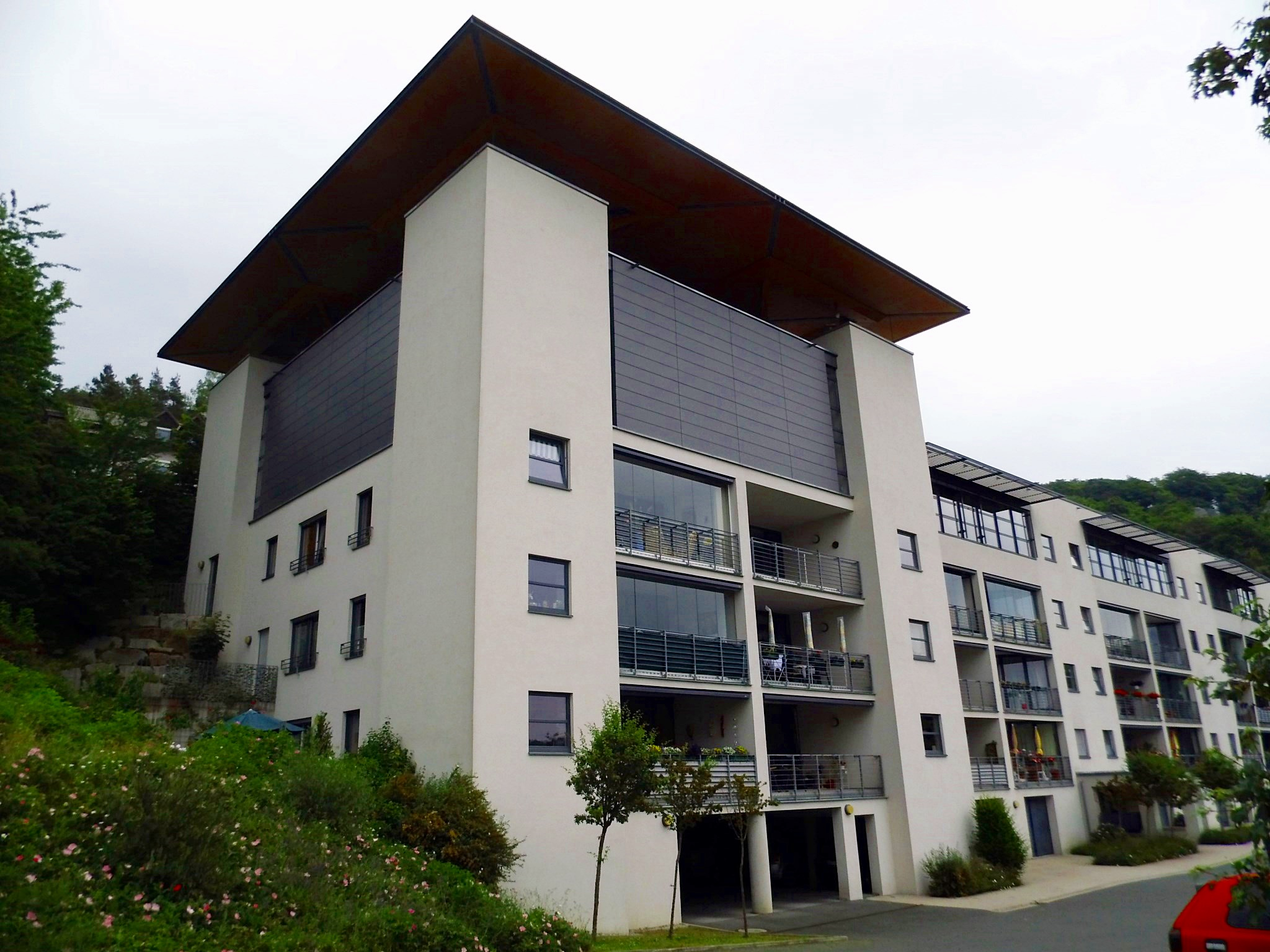 Baptistische Christuskirche in Heiligenstadt in Oberfranken